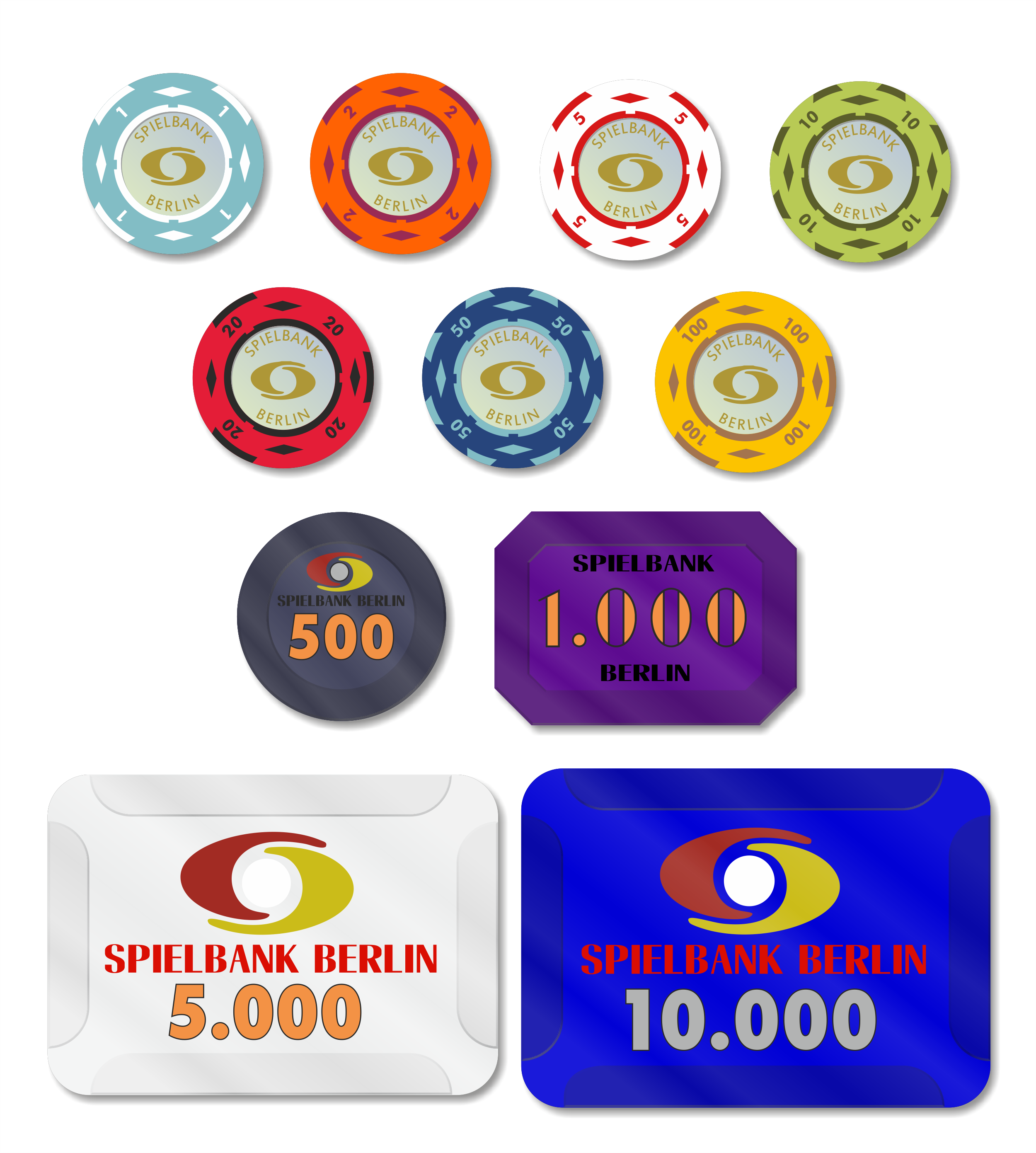 Cash Values (Chips/Jetons) der Spielbank Berlin im klassischen Spiel und Poker